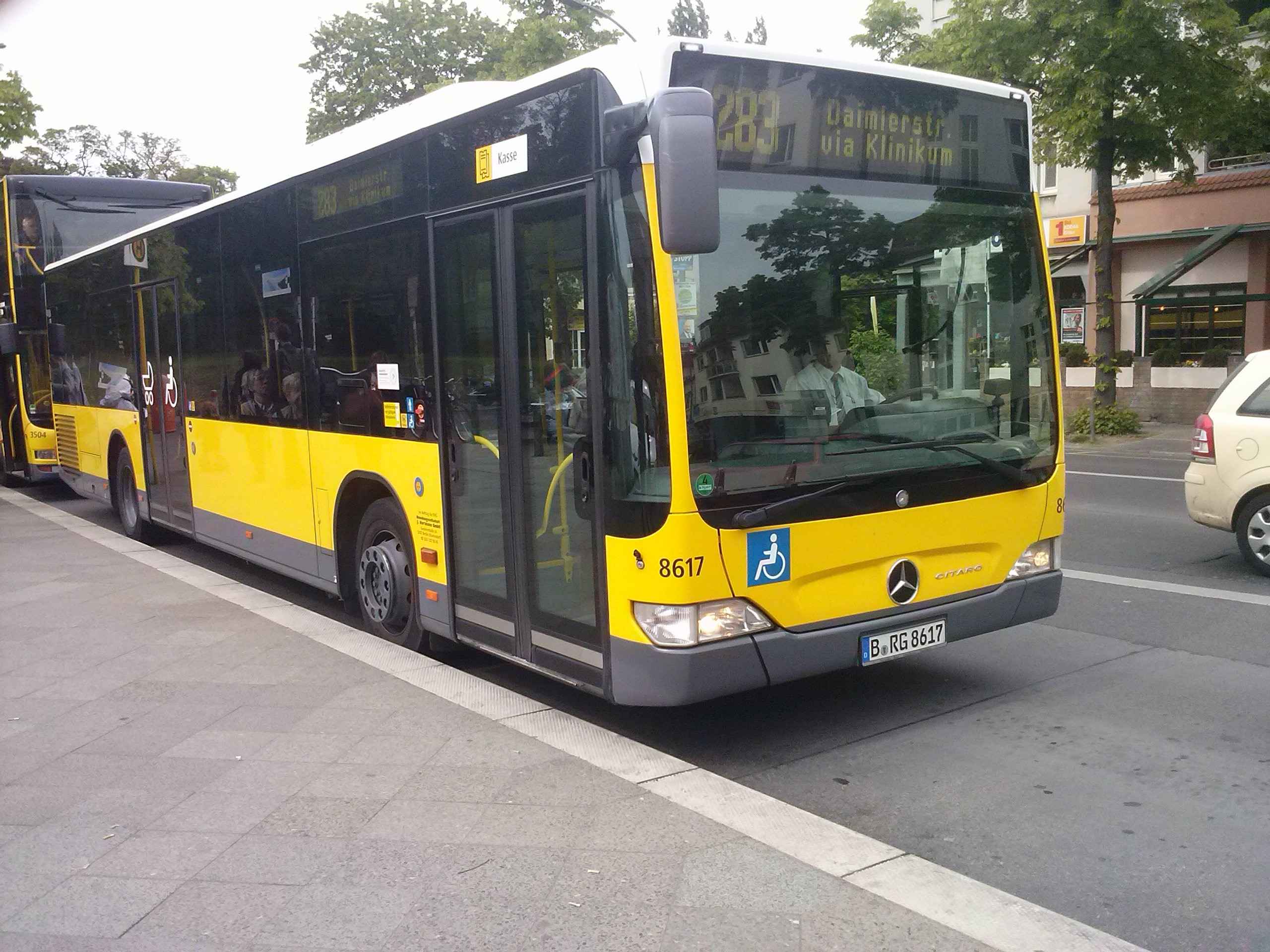 BVG Bus 8617 von Hartmann/Der Südender